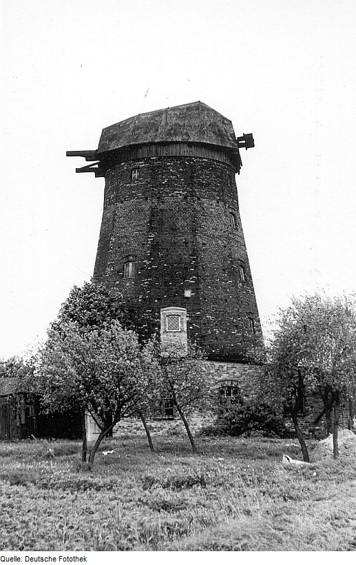 Original image description from the Deutsche Fotothek Märkische Heide-Groß Leine. Turmholländer